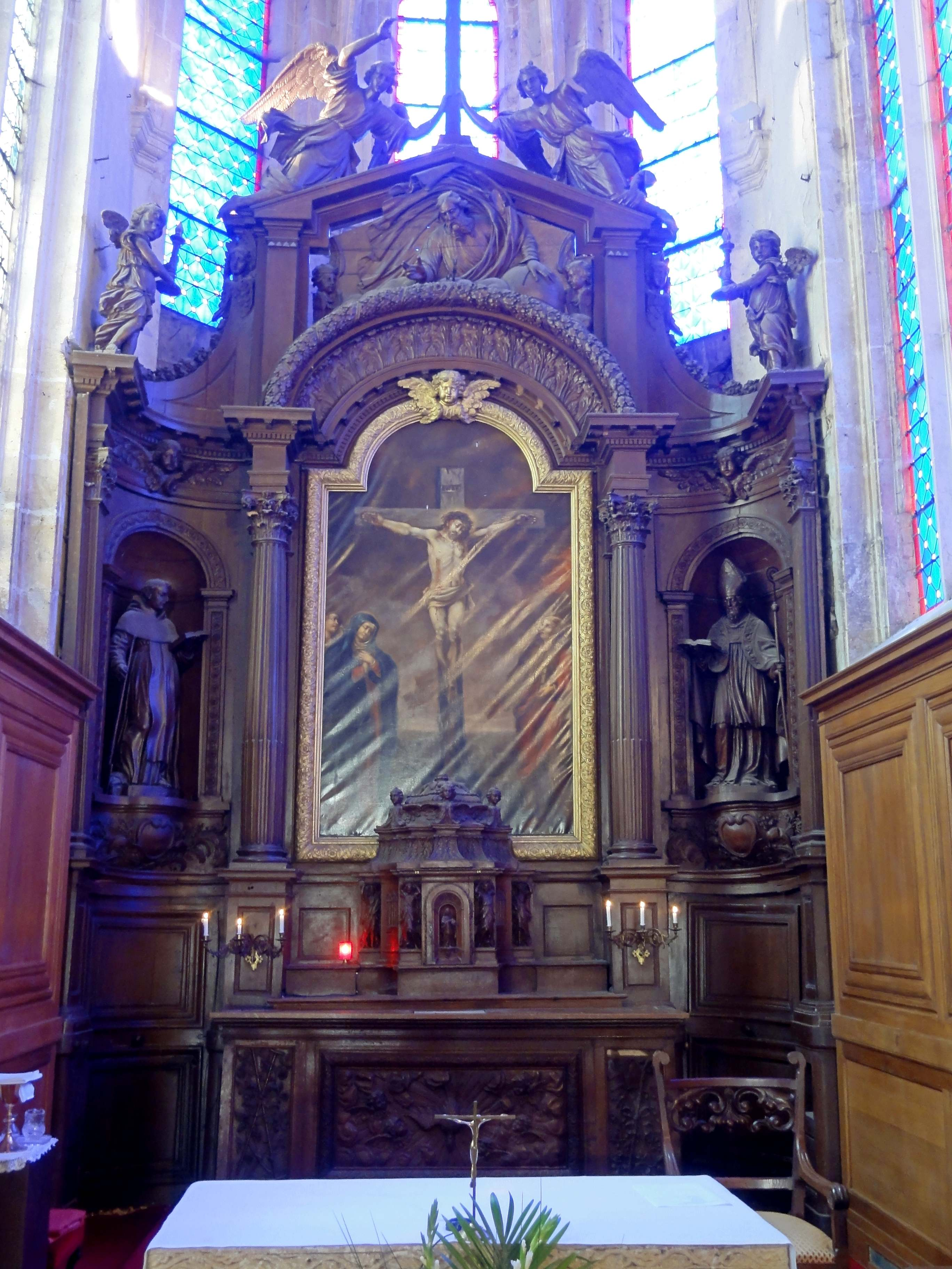 Retable du maître-autel.